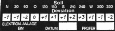 Luftfahrttabelle